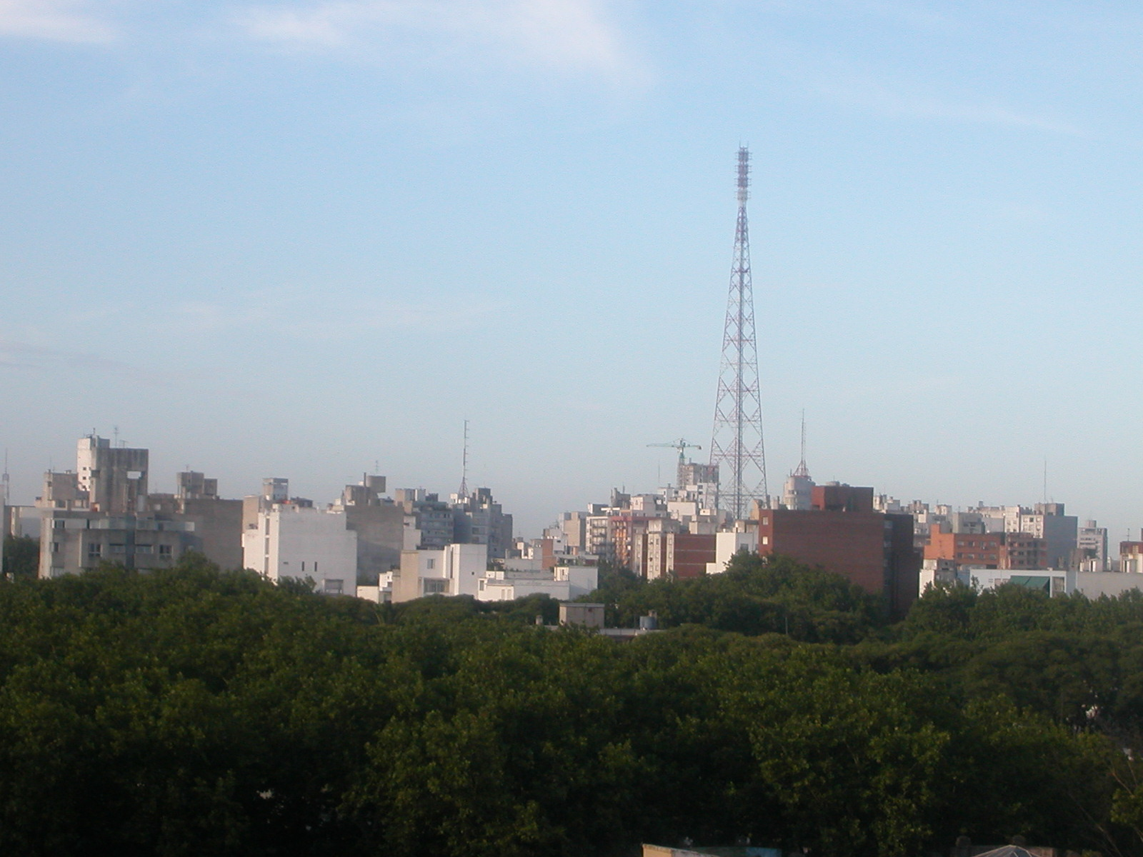 Беларуская (тарашкевіца): Монтэвідэа.